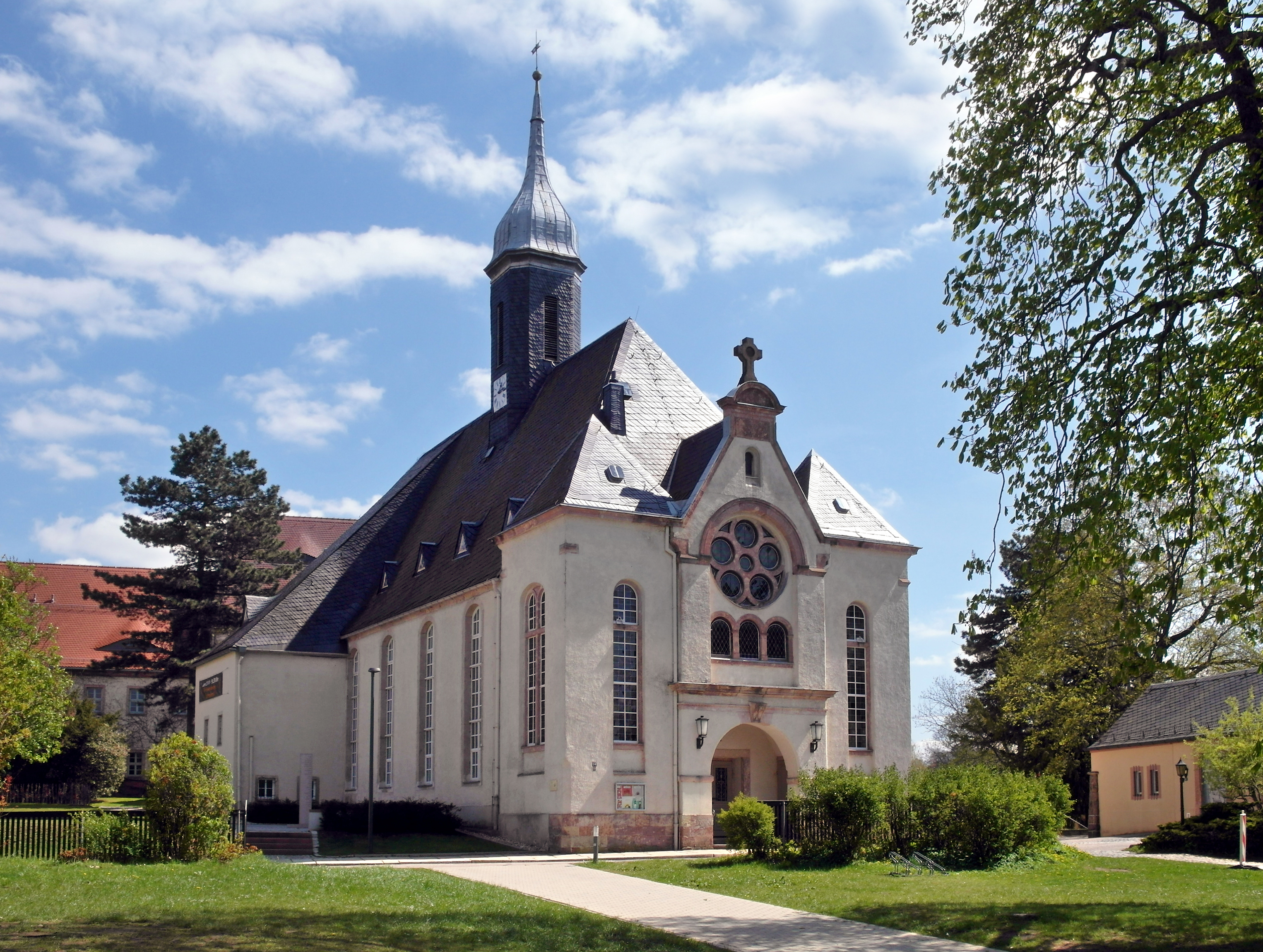 24.04.2017 09212 Limbach (Limbach-Oberfrohna): Evangelische Stadtkirche Limbach, Kirchstraße (GMP: 50.858131,12.767089). Erste Kirche 1346. Heutige Kirche nach Umbau von 1811. Sicht von Nordwesten. [SAM9460.JPG]20170424180DR.JPG(c)Blobelt